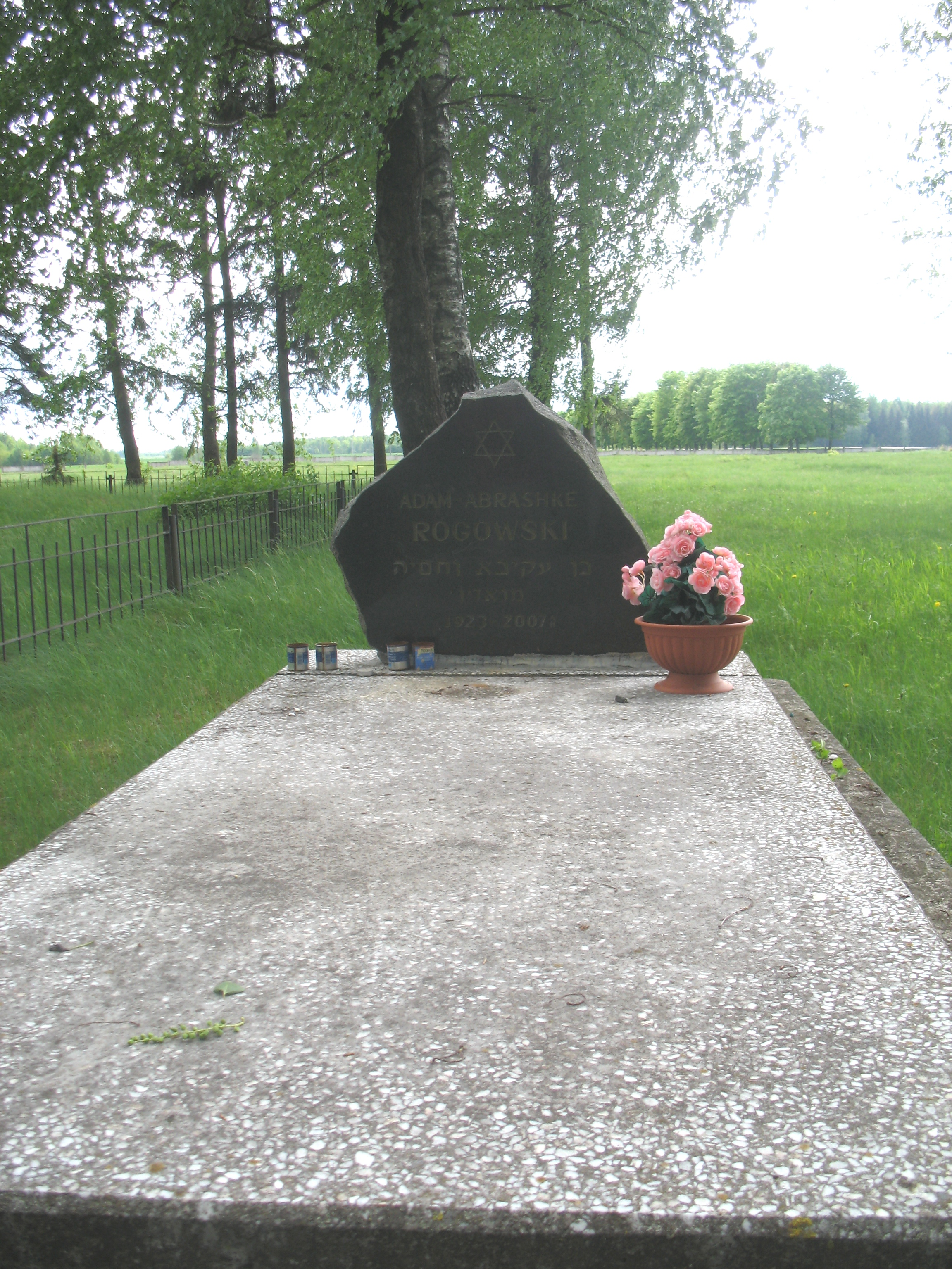 Памятник Адаму Роговскому на еврейском кладбище в поселке Радунь Вороновского района Гродненской области. Адам Роговский в начале 1943 года вместе с частью радуньских евреев сбежал от расстрела и стал бойцом партизанского отряда. После войны Адам Роговский написал книгу воспоминаний.